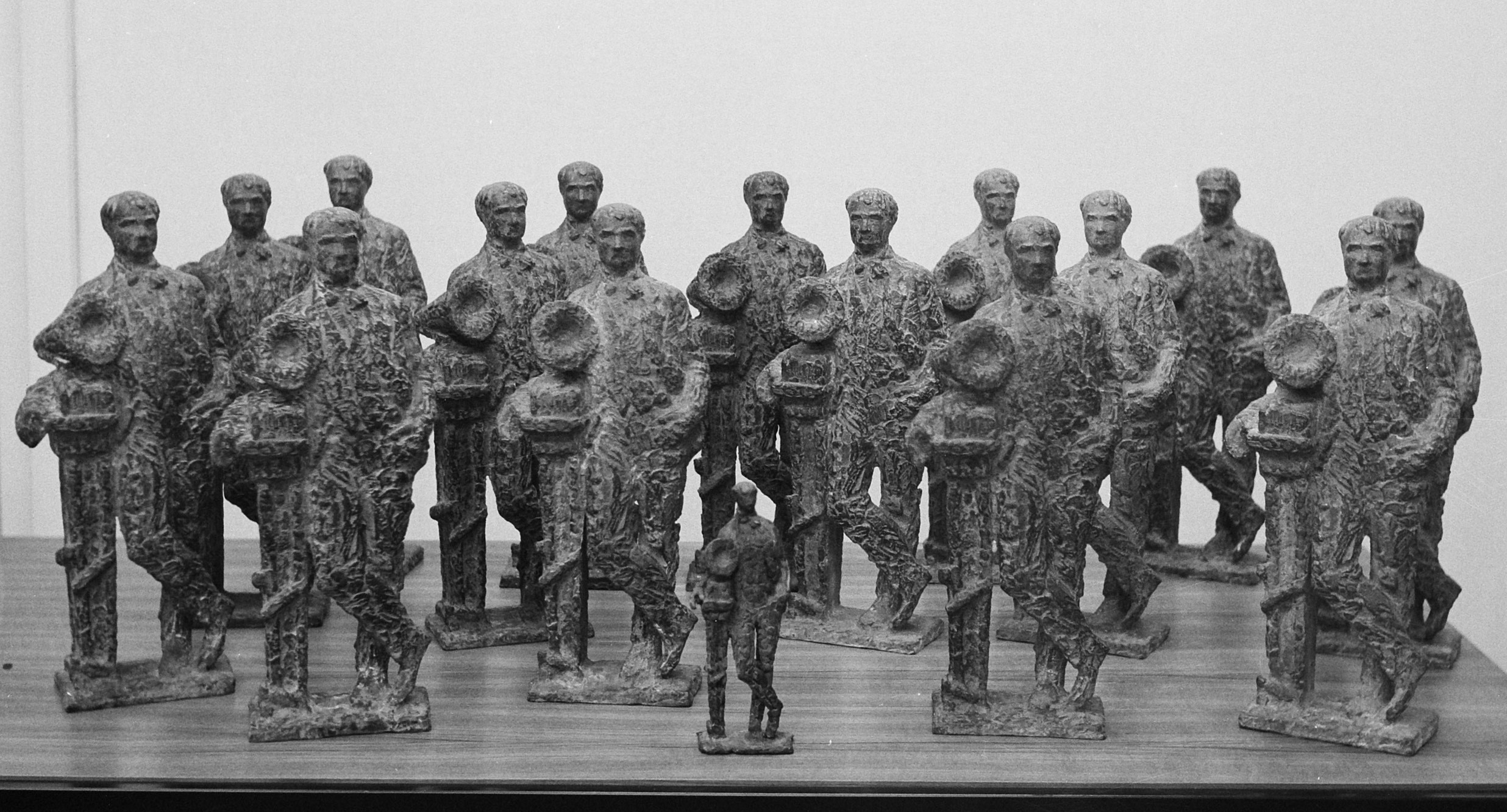 Edisons beelden voor Grand Gala winnaars